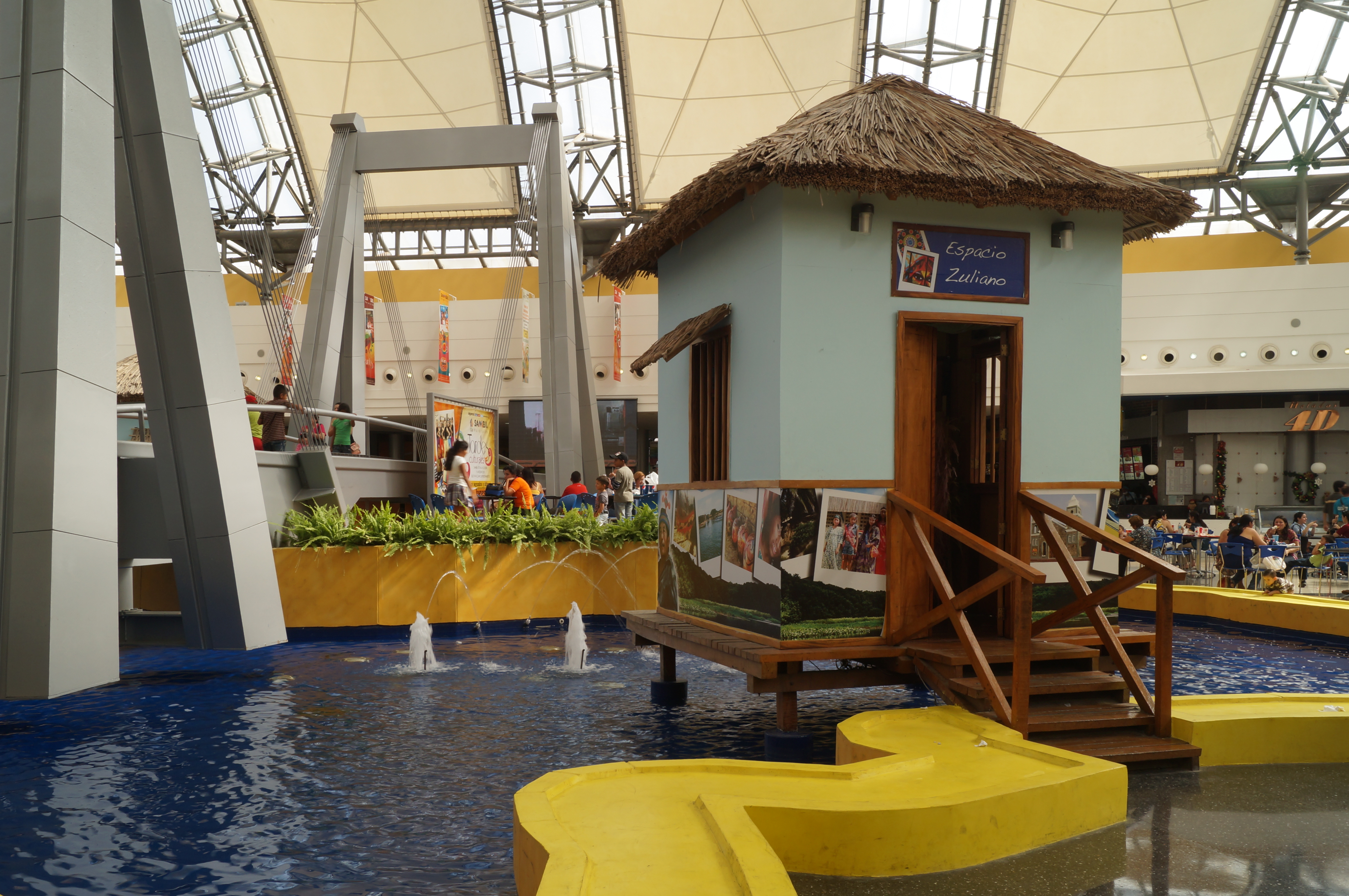 Venta de bisutería. Centro Comercial Sambil. Maracaibo. Venezuela